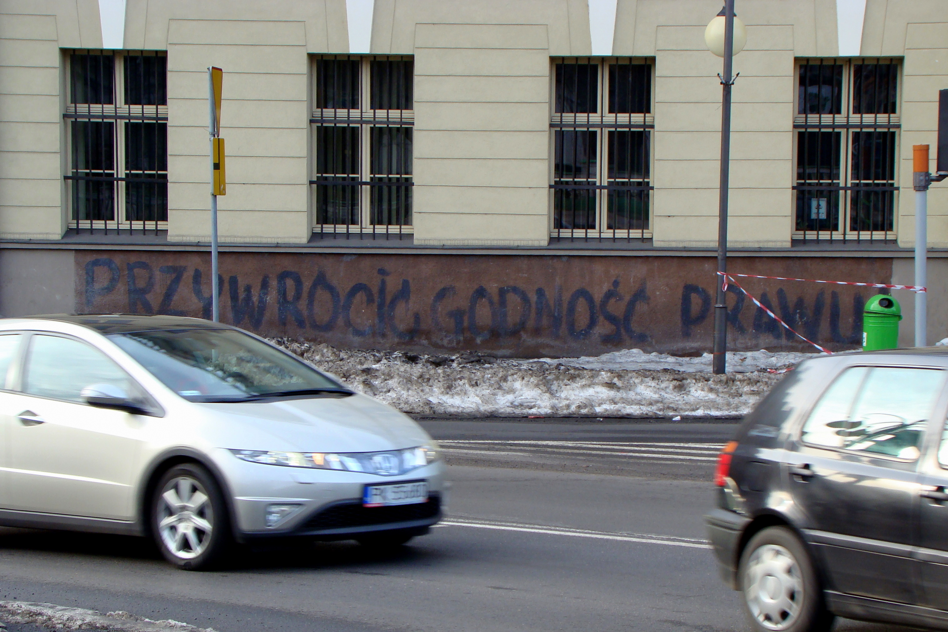 "Przywrócić godność prawu", napis wykonany przez Bogusława Śliwę na frontonie Sądu Okręgowego w Kaliszu w 1981 r.( widok współczesny )